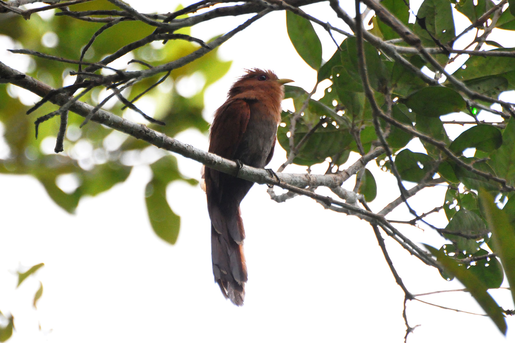 Little Cuckoo Coccycua minuta minuta, Sasha Lodge, Ecuador